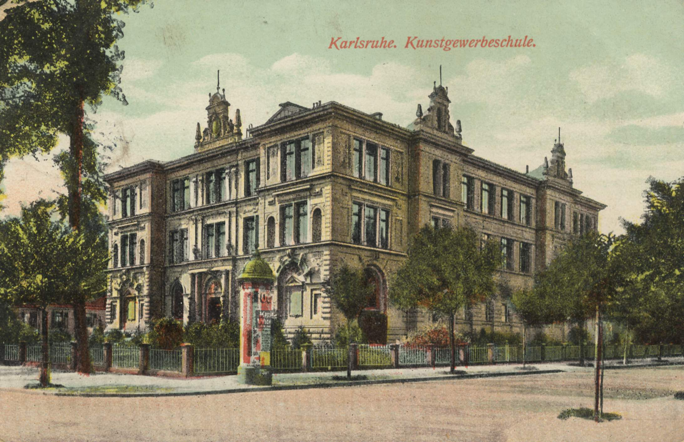 Kunstgewerbeschule